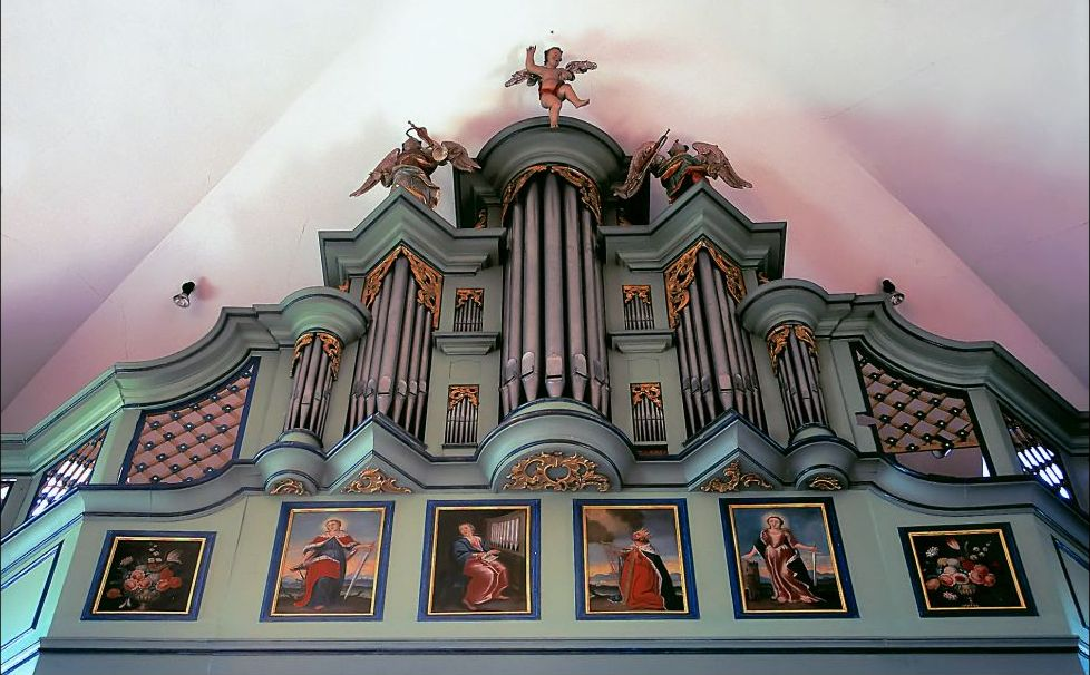 Johann-Christian-Köhler Barockorgel in der Pfarrkirche St. Nikolaus